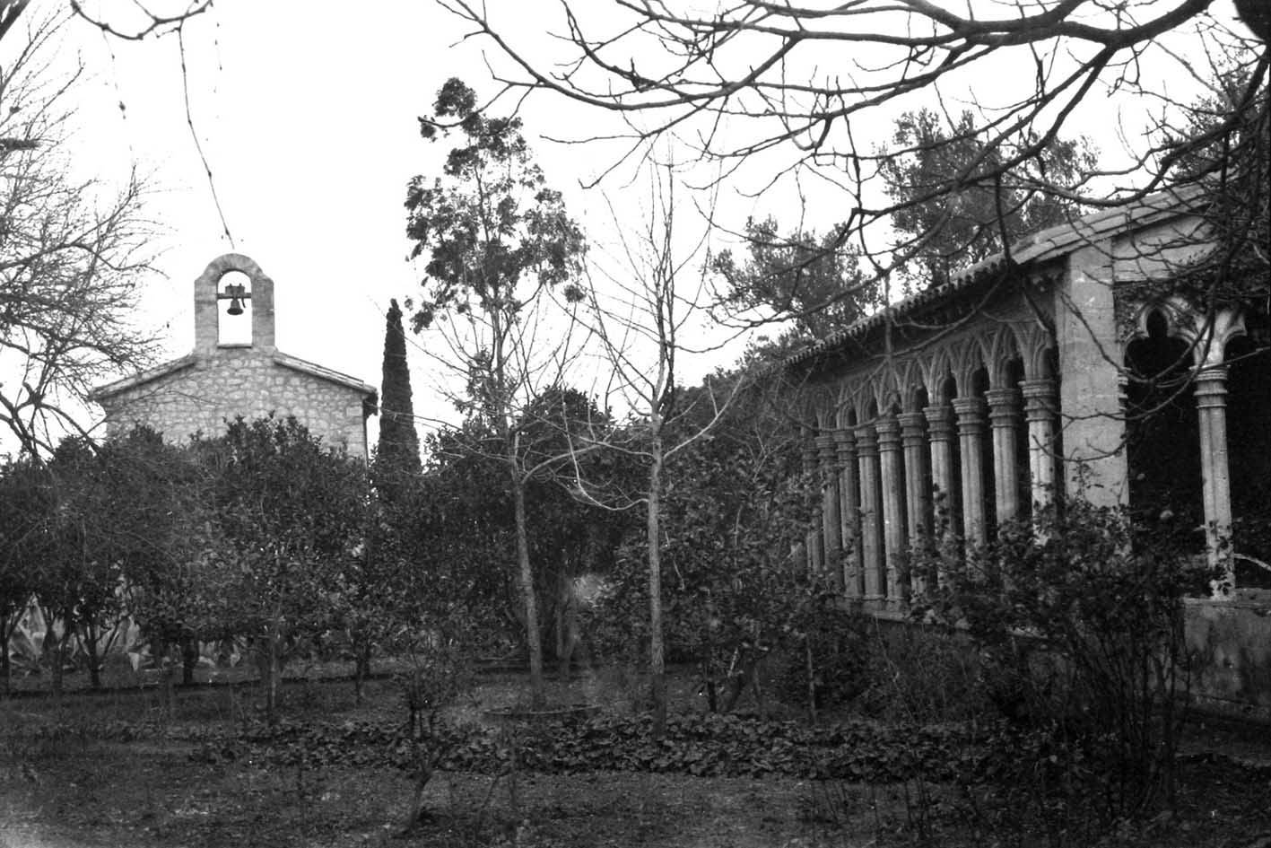 Claustret a Miramar. Francesc Matheu i Fornells (1920)